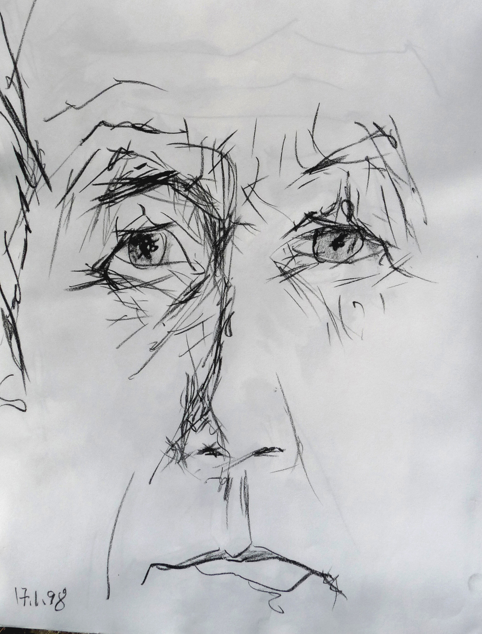 Christof Dörge (Selbstbildnis)